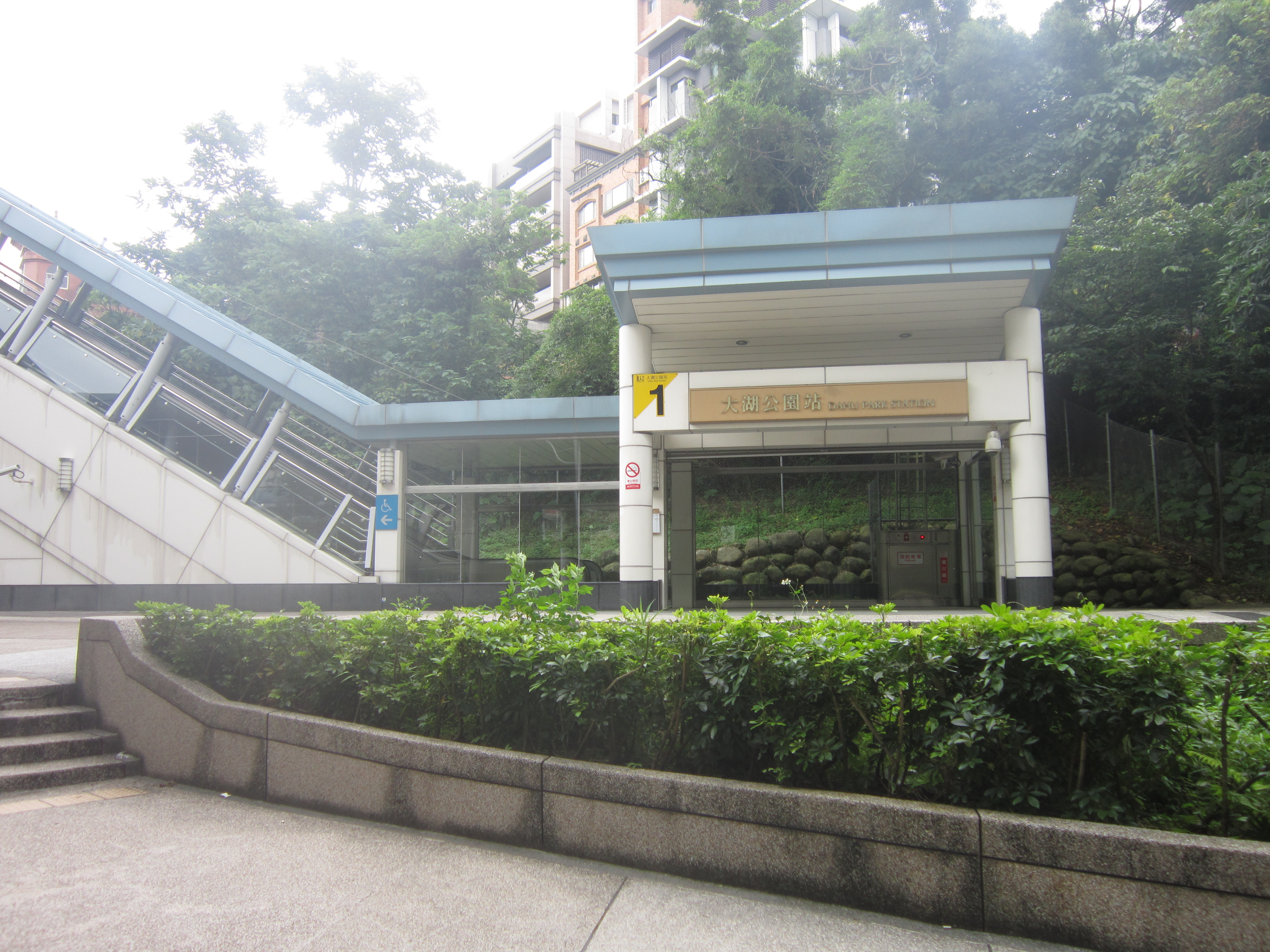 台北捷運大湖公園站1號出口。